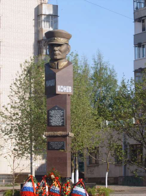 Памятник дважды Герою Советского Союза Маршалу Советского Союза Ивану Степановичу Коневу в г. Вологде. Бронза, гранит. Высота 9,5 метров. Автор: скульптор Олег Александрович Уваров